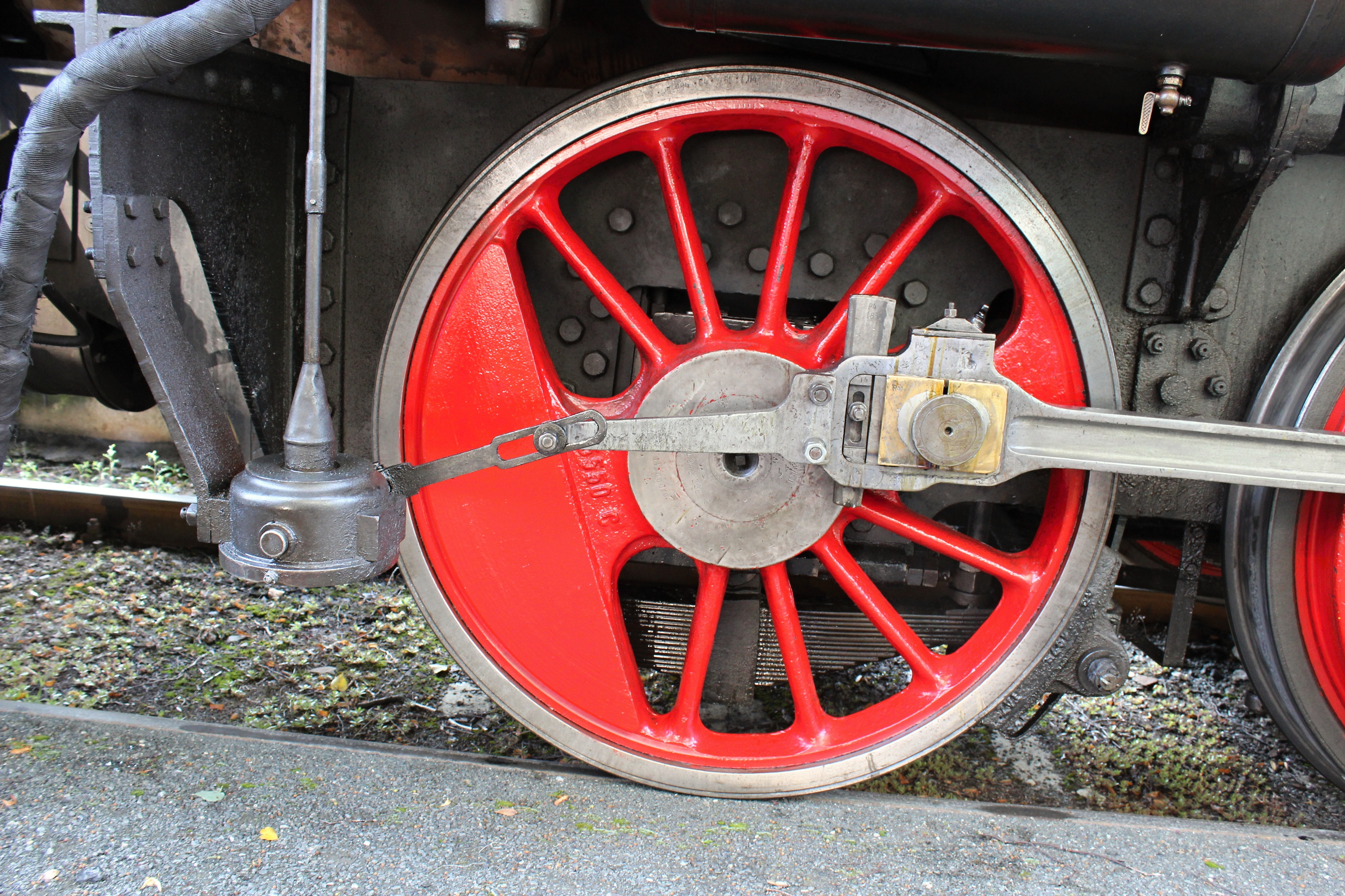 Parní lokomotiva 4342186 (4343186) "Čtyřkolák" na čele nostalgického vlaku na nádraží Praha - Braník 30.8. 2014 v 9.11 připravena k výjezdu na trať Posázavského Pacifiku Nostalgická jízda na trati Praha – Braník – Čerčany a zpět. Číslo stroje: 4343186 – na kotli ČSD 4342186 – na boku Údaje na originálním výrobním štítku: Výrobce: Akc. spol. strojírny dříve BREITFELD, DANĚK i spol. Slaný Č.: 95 Rok výroby: 1917 Provozovatel: Pražská dráha Depo Vršovice Více na